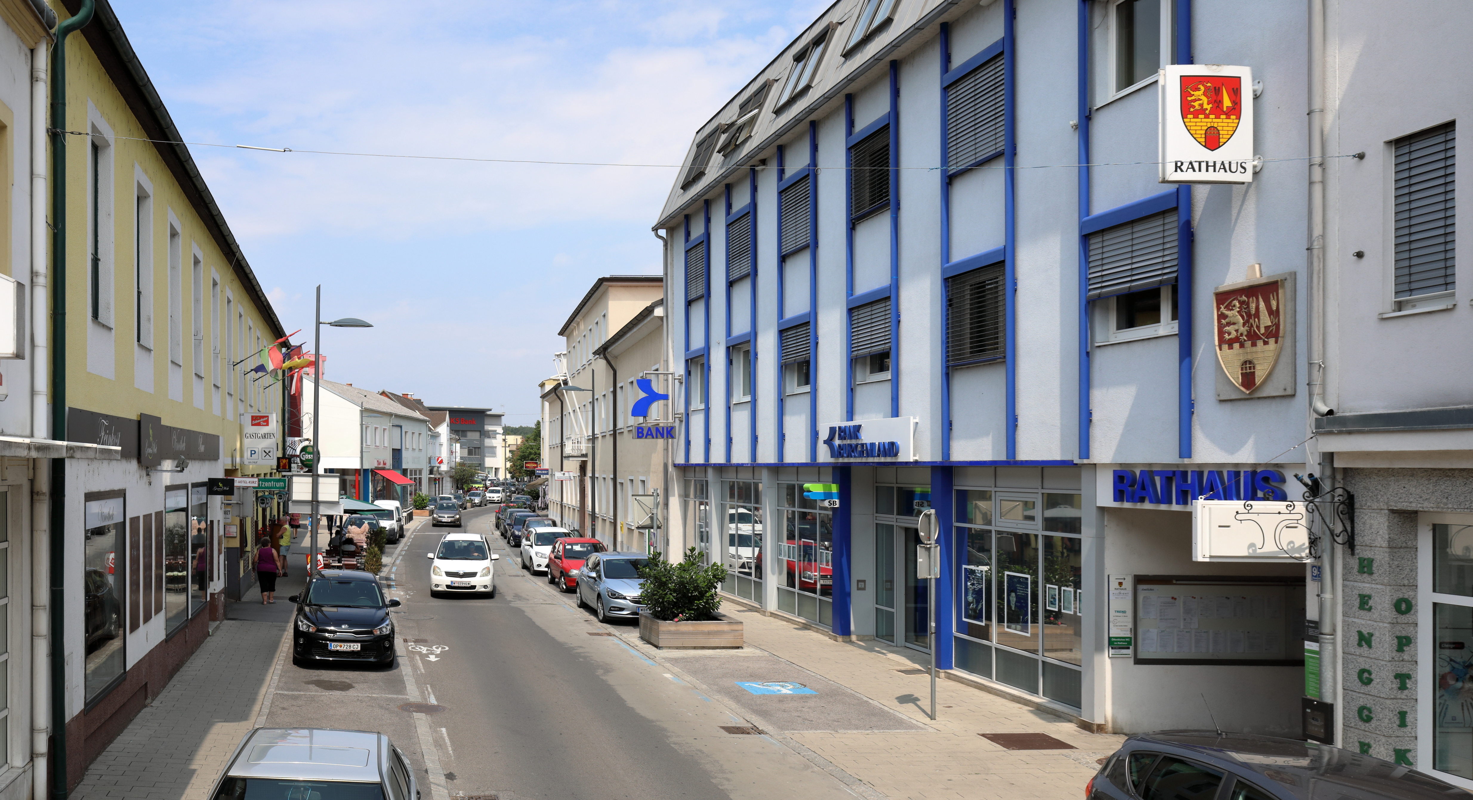 Hauptstraße und Ortszentrum der burgenländischen Stadtgemeinde Oberpullendorf im Bereich des Rathauses (Hauptstraße Nr. 9) und anschließend das Bezirksgericht.